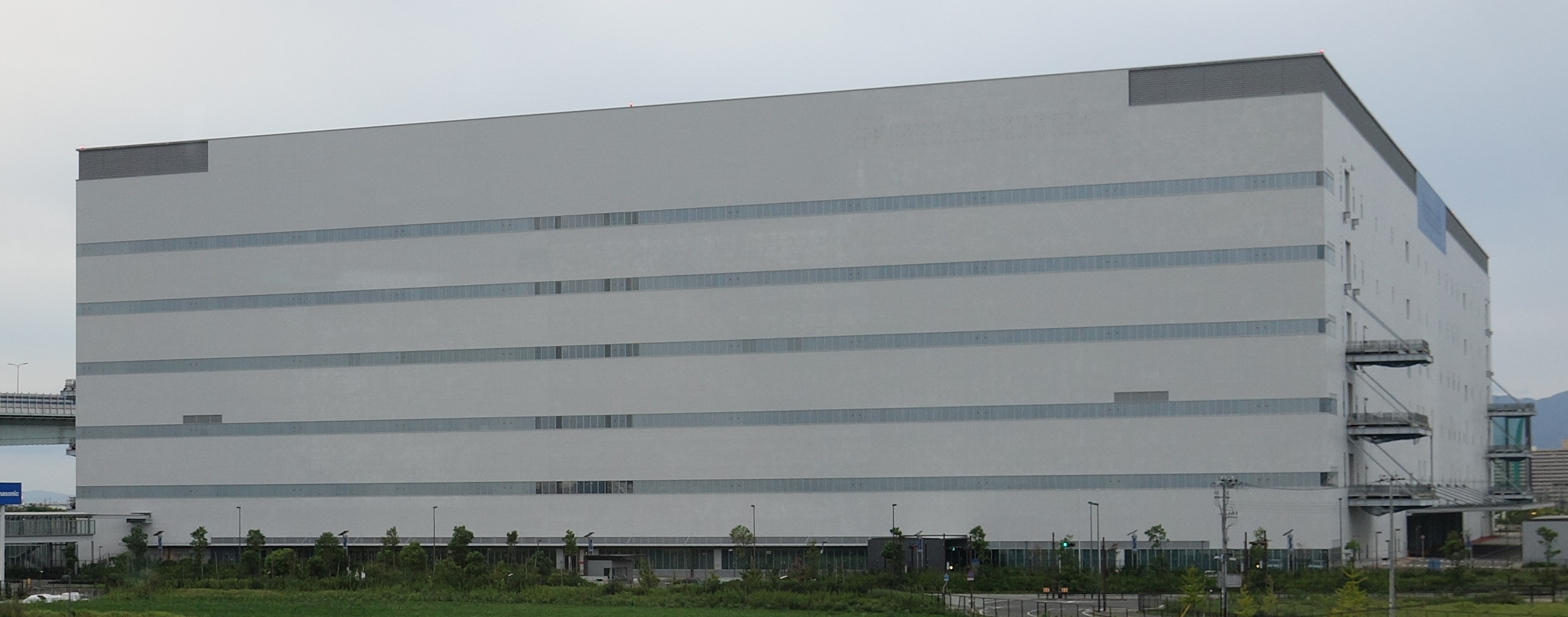 旧パナソニックプラズマディスプレイ 尼崎工場